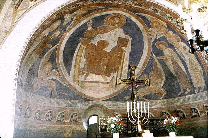 Skibby Kirke i Danmark. Apsis, Dommedagskristus